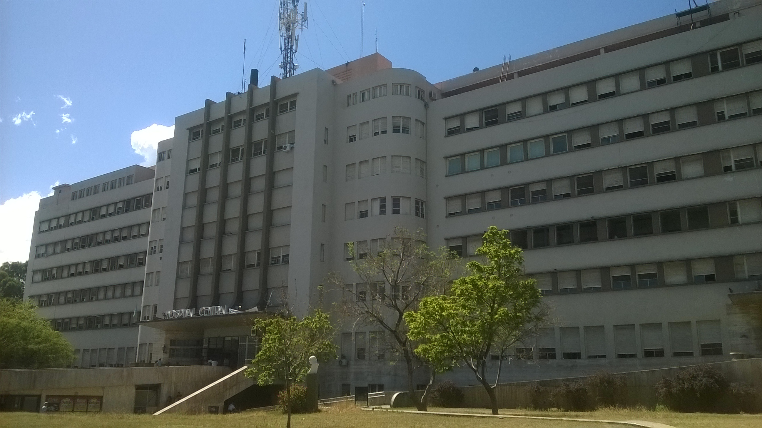 Hospital Central de Mendoza. El imponente edificio racionalista, de 27.689 m², fue diseñado por Manuel Civit e inaugurado en 1945.